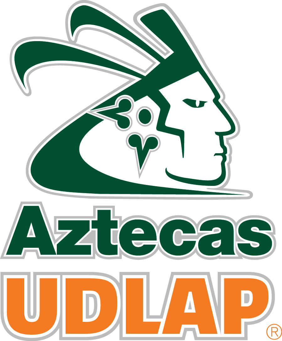 Logo del Equipo de Aztecas de la UDLAP